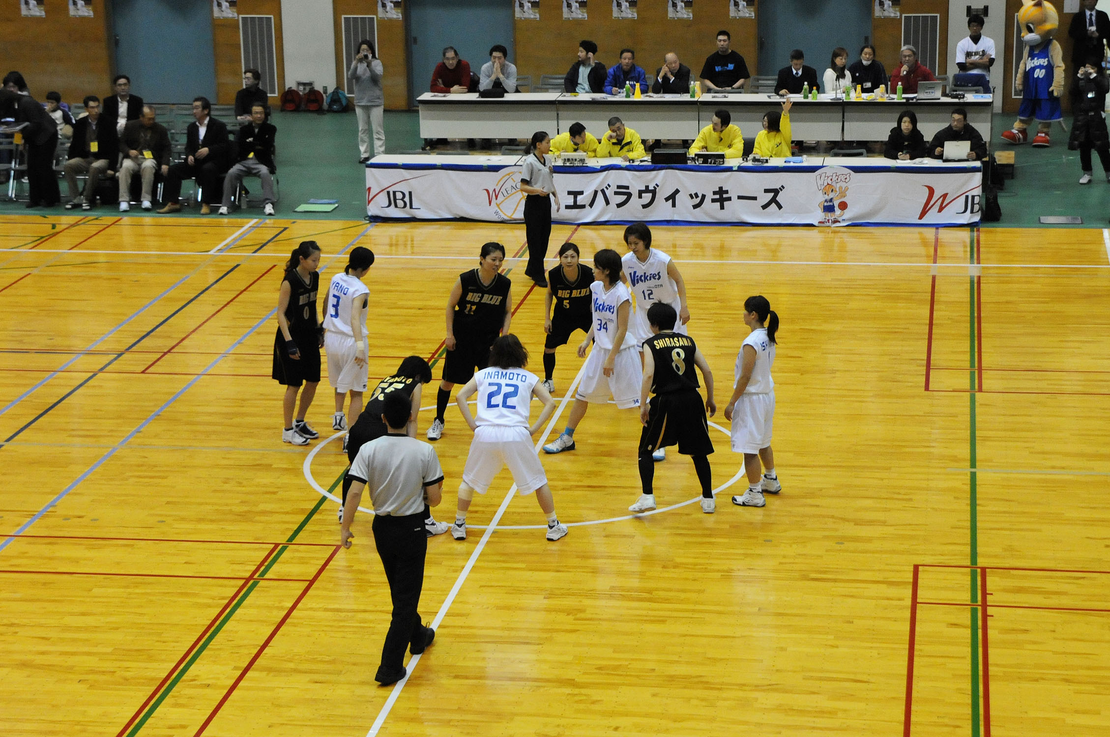 WJBL 08-09レギュラーリーグ WI、エバラ対ビッグブルー東京。大田区立大森スポーツセンターで。